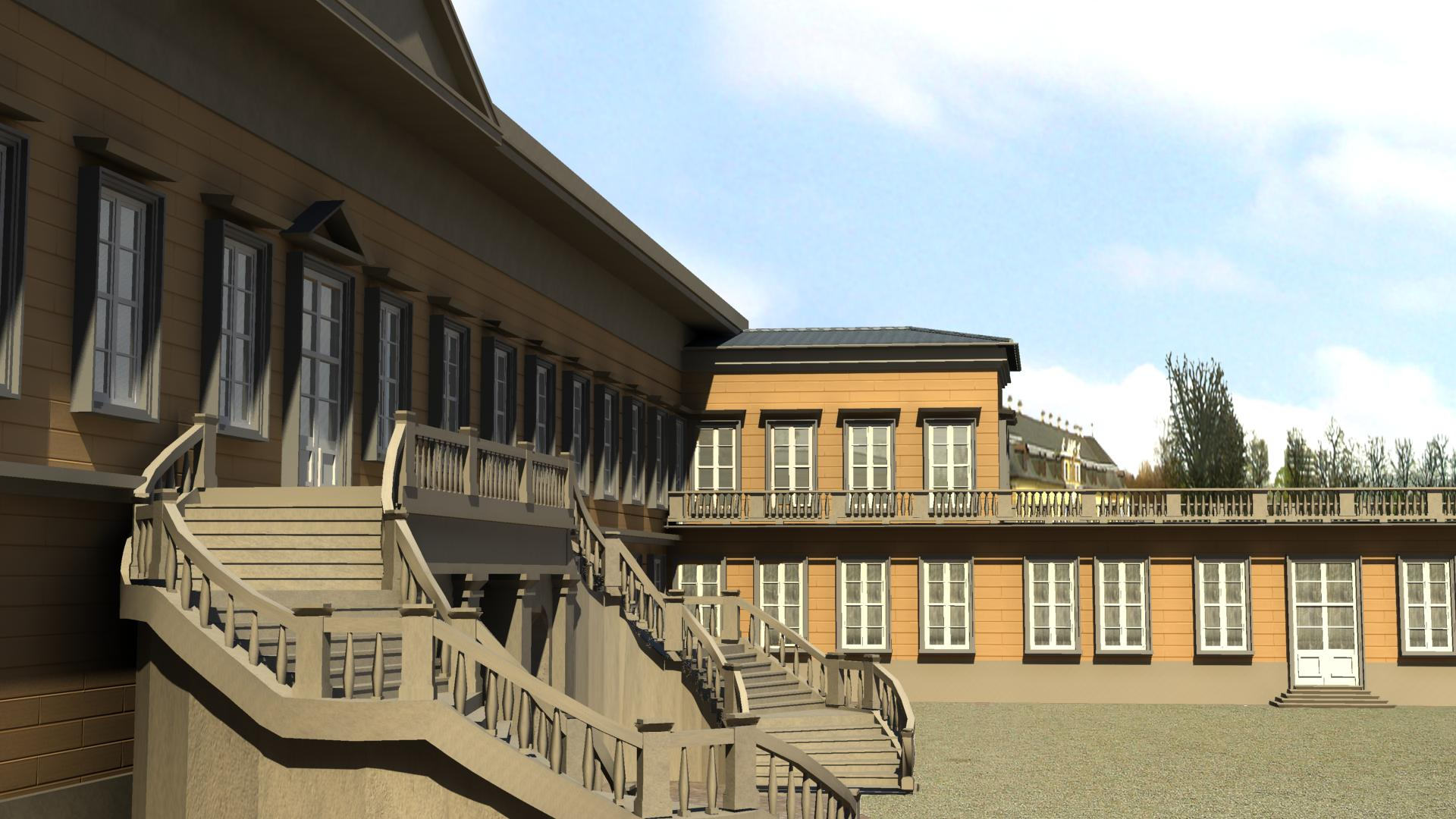 Schloss Herrenhausen, Hannover